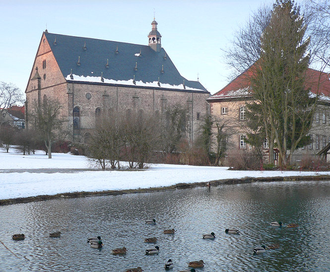 Klosterkirche Lamspringe, vom Klostergarten mit Teich aus gesehen.